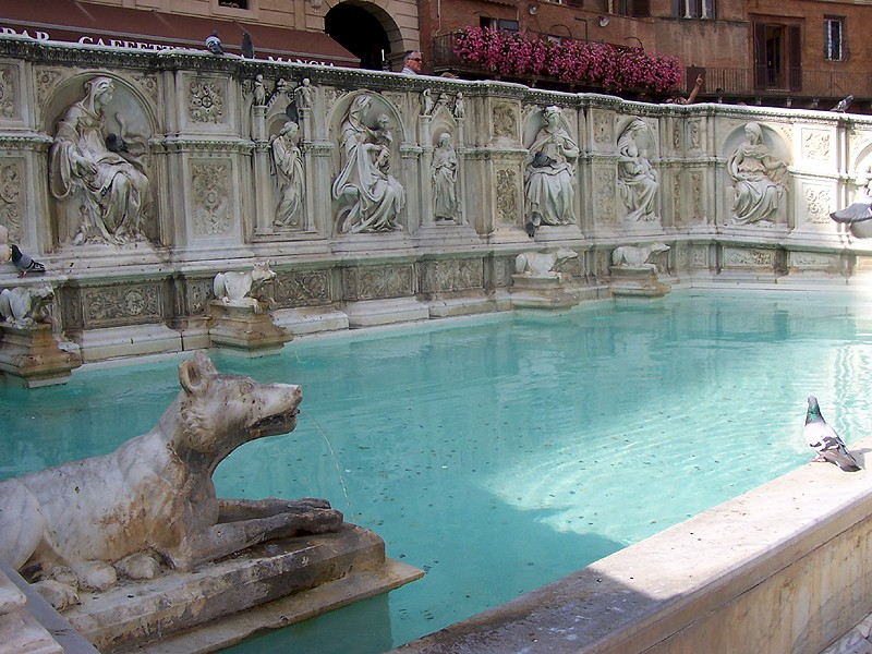 Siena - Fonte Gaia